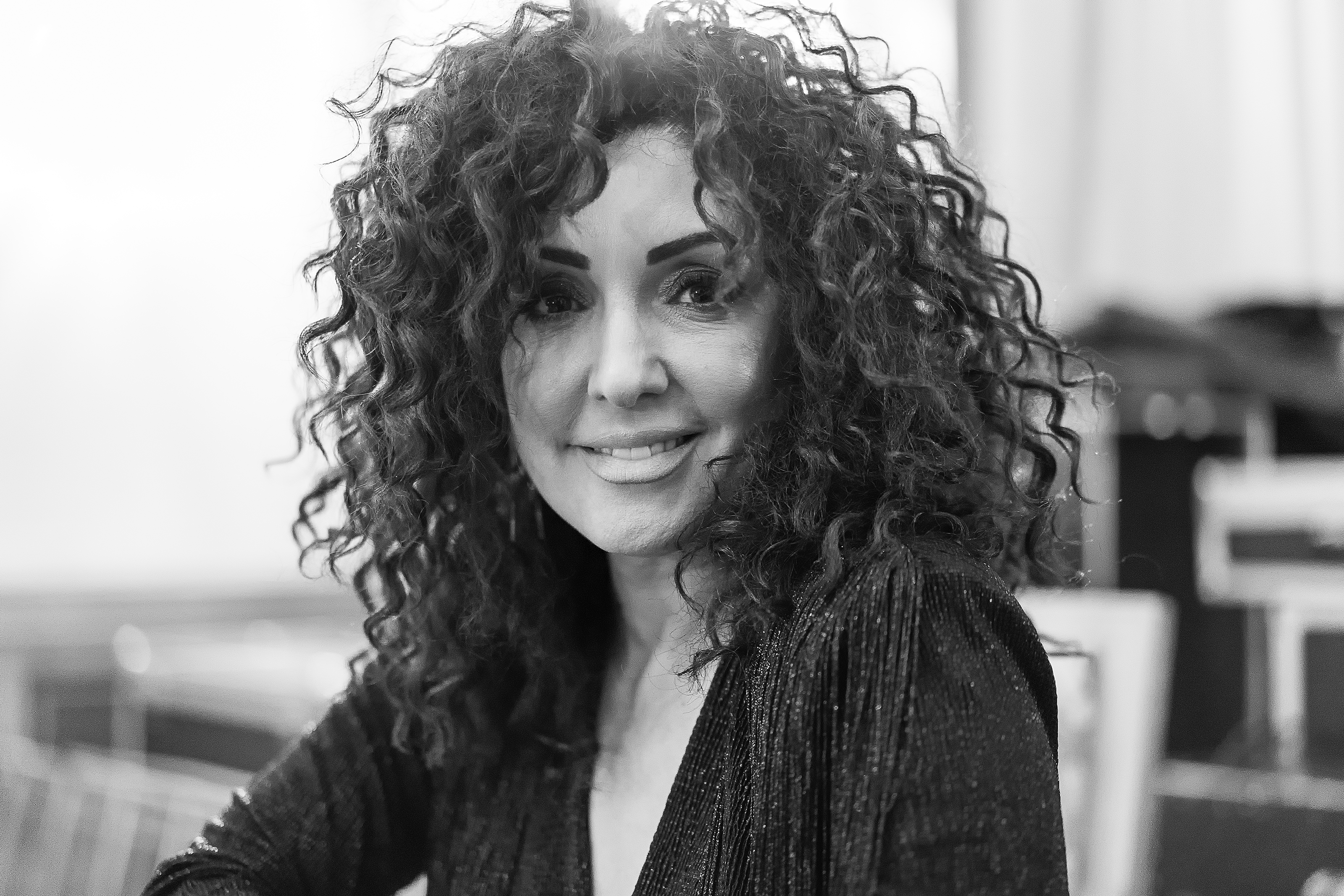 Nicoleta Matei (Nico), Palatul Snagov, 6 octombrie 2018